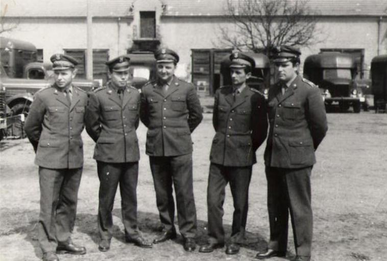 Garnizon Przasnysz, 1973r. Kadra JW 4420